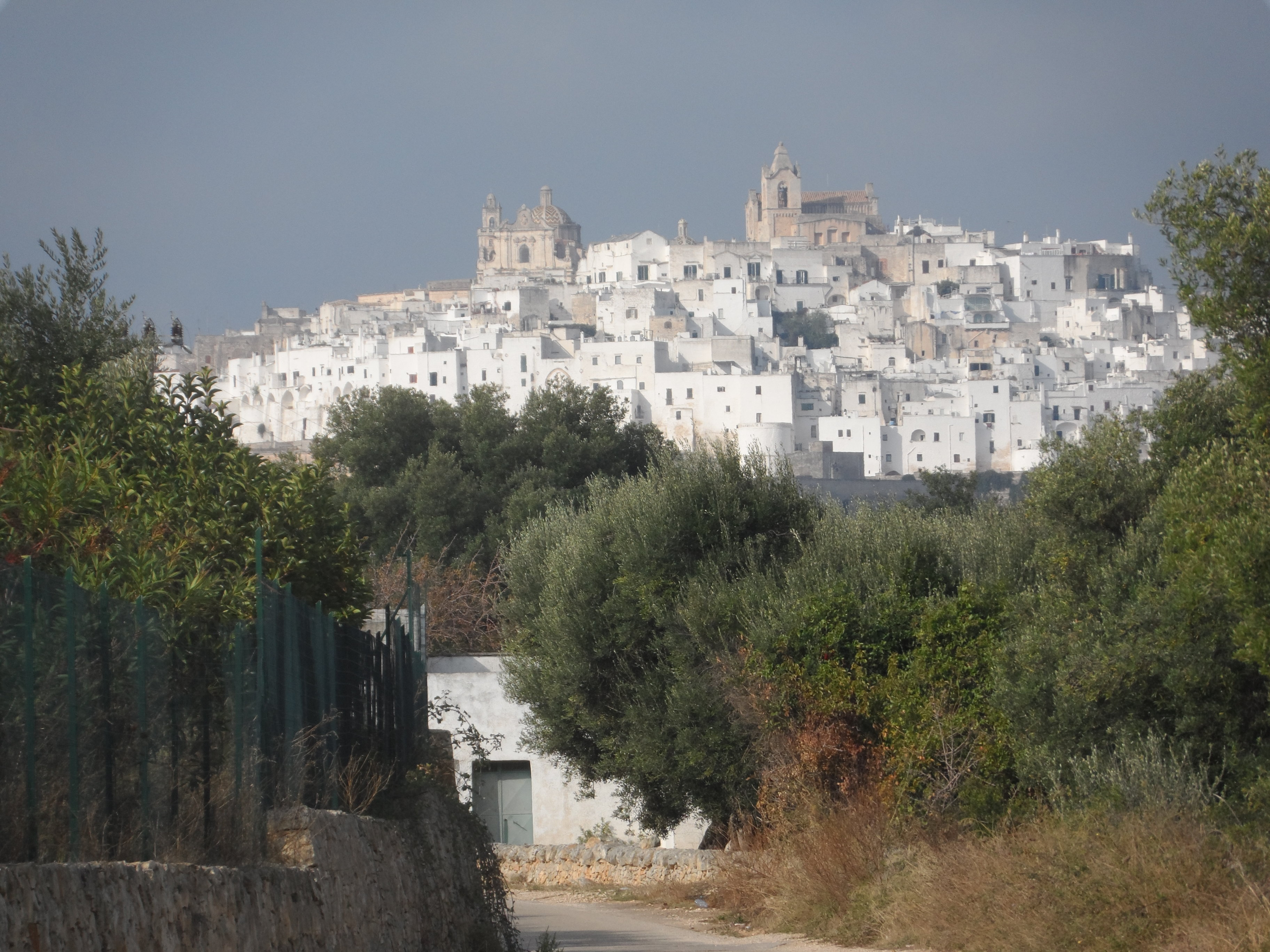 Ostuni vue de l'Est